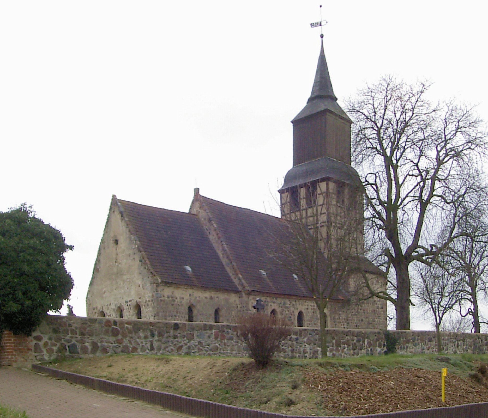 Kirche in Kunow, Brandenburg, Deutschland